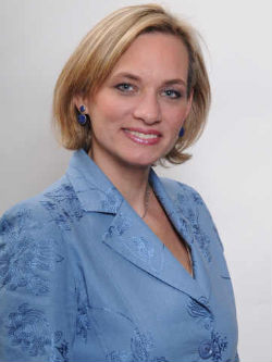 Carolina Goić Borojević